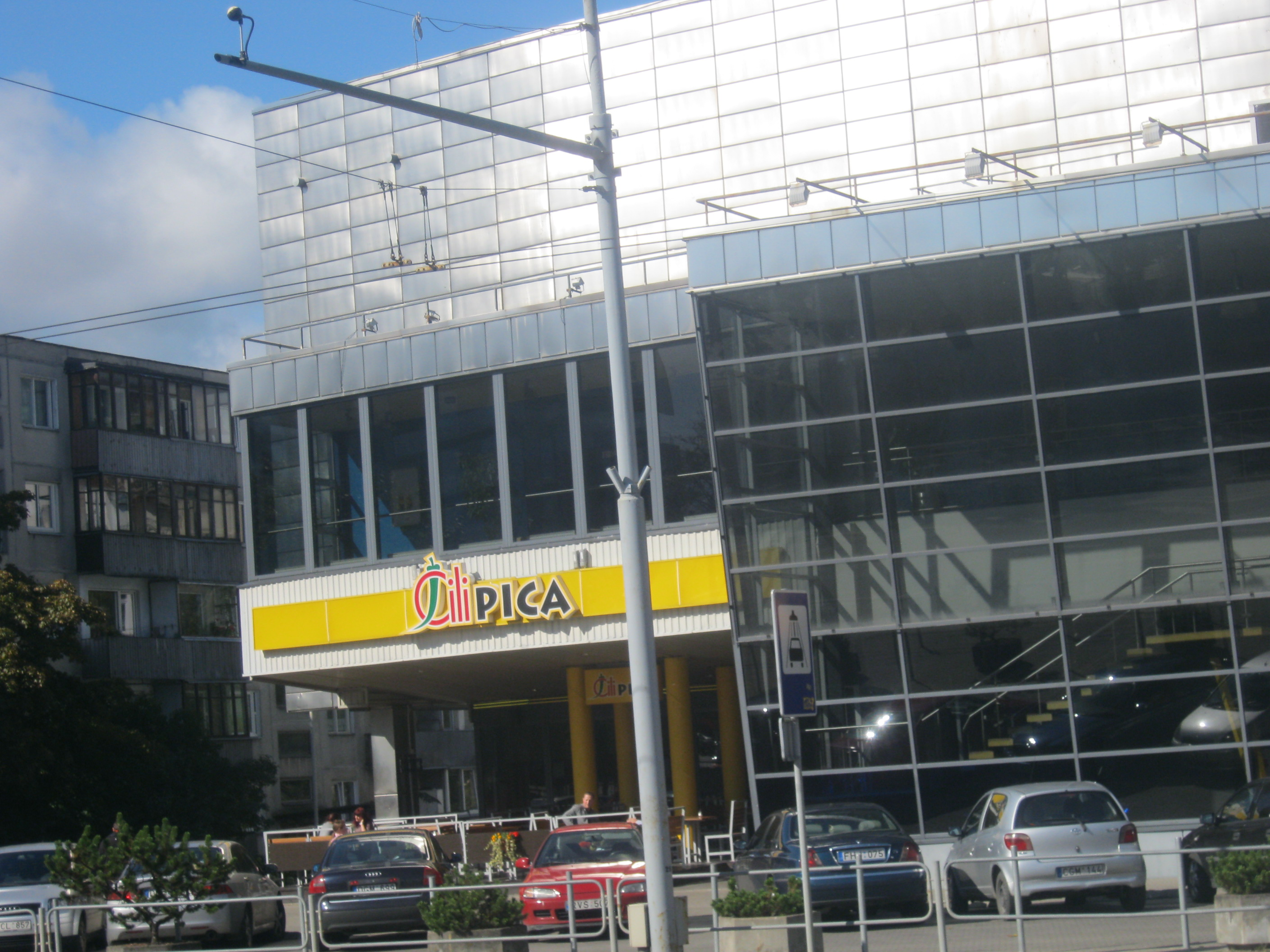 Čili Pica Naujamiestis